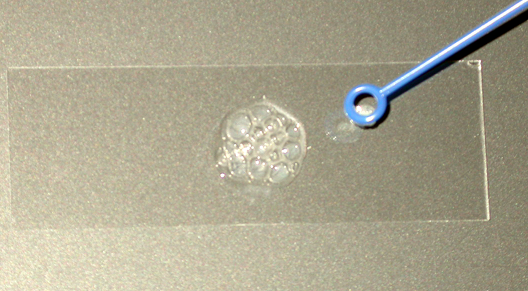 Réaction de la catalase (S.aureus) (image personnelle) Philippinjl 21 mai 2003